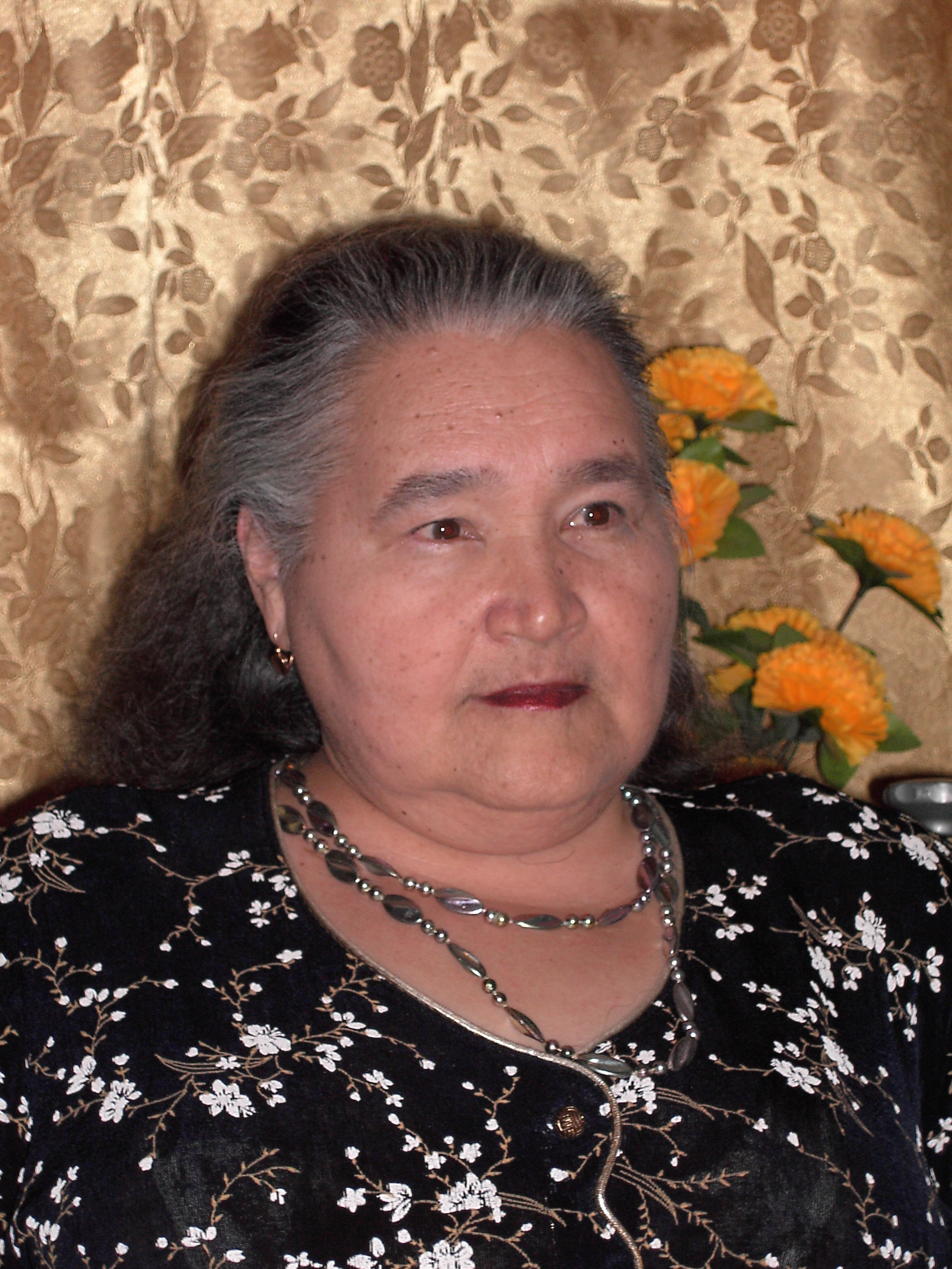 Башҡортса: Шафиҡова Кәүсәриә Фиҙай ҡыҙы — шағирә, Башҡортостан Республикаһы яҙыусылар союзы ағзаһы (1999).